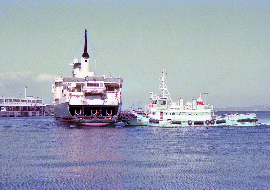 接岸中の国鉄 青函連絡船 大雪丸と補助汽船 ふくうら丸